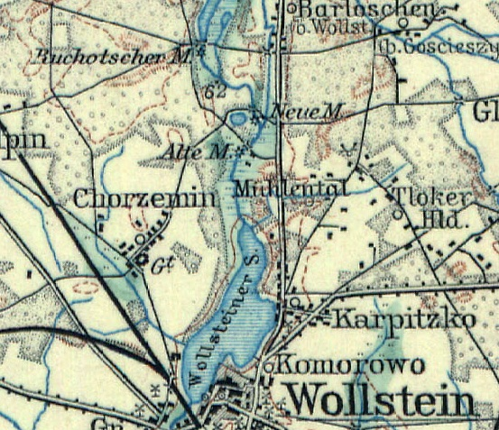 wg mapy: Topographische ubersicht des Deutschen Reiches, 92 Zullichau, Skala 1:200000